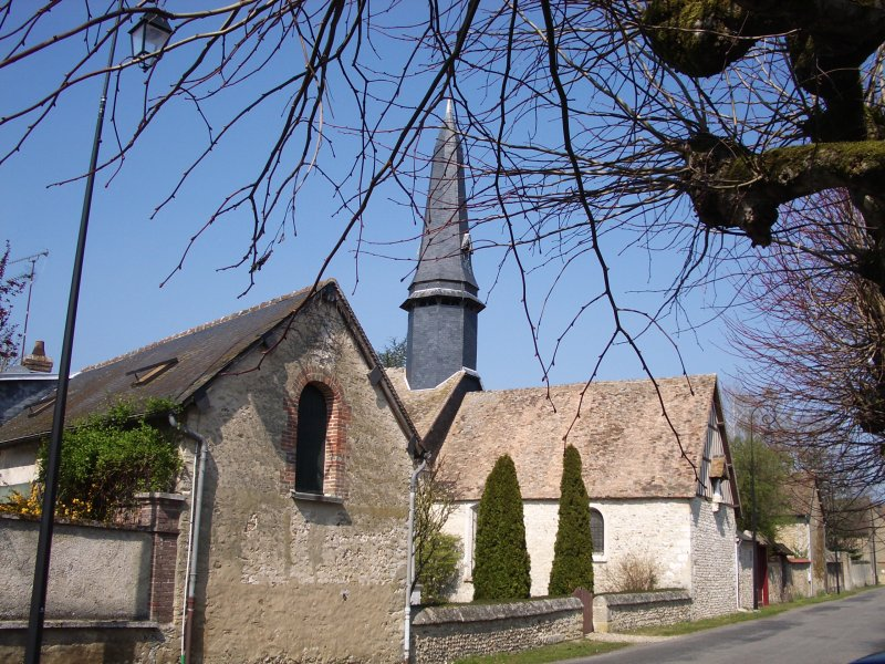 L'église de Vaux-sur-Eure